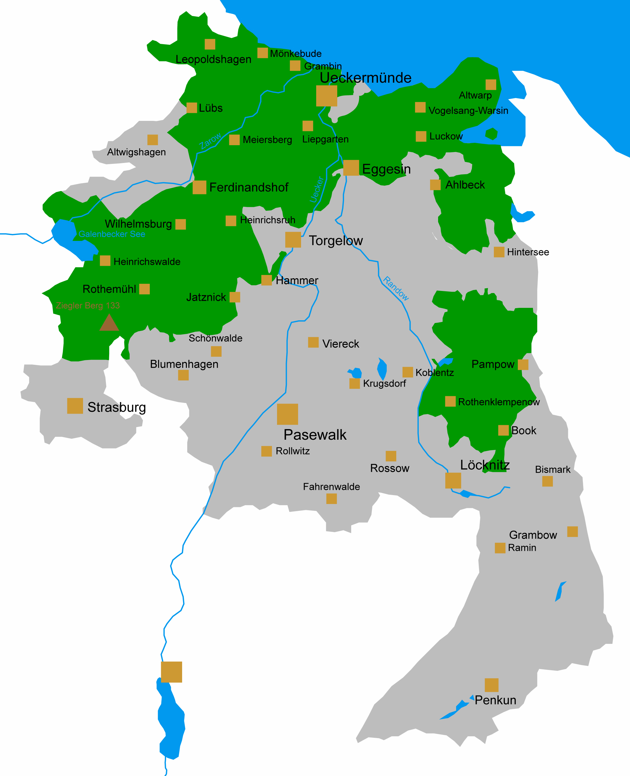 Lage des Naturparks im Uecker-Randow-Kreis